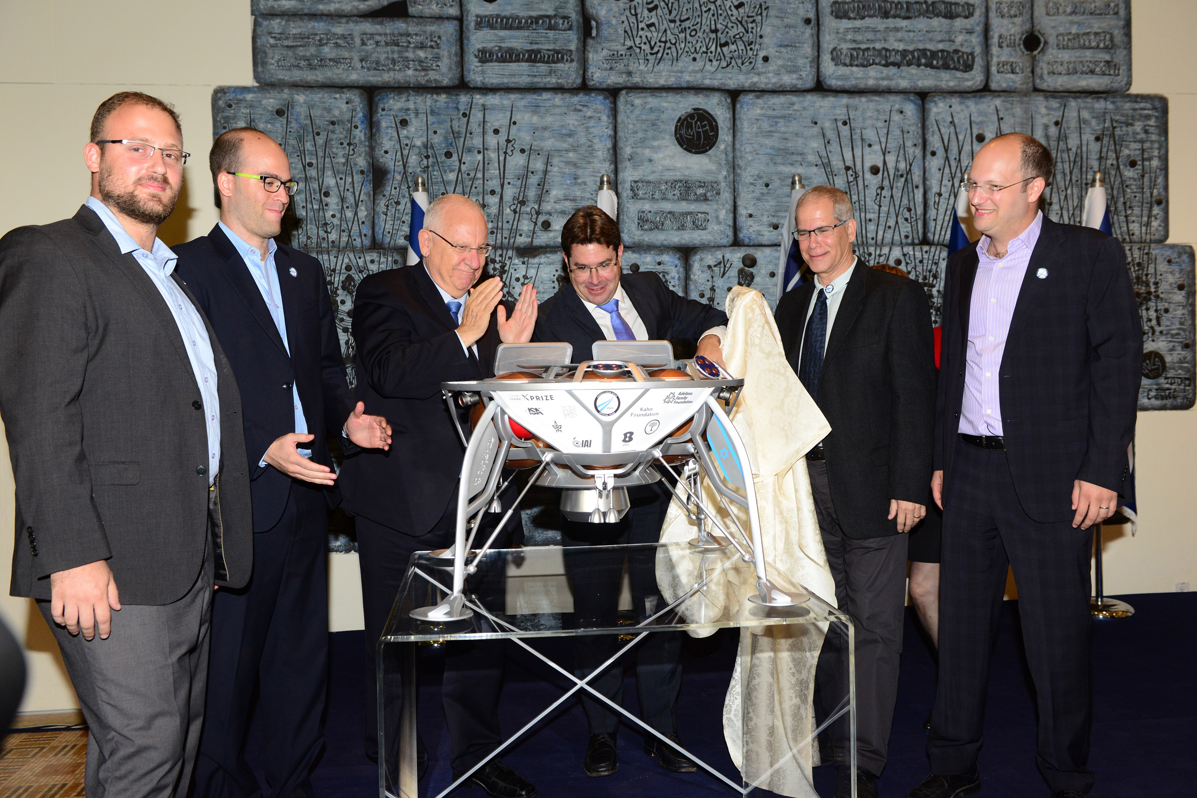 חשיפת דגם החללית בטקס הכרזת חוזה השיגור בבית הנשיא בירושלים, אוקטובר 2015. ימין לשמאל: יריב בש, ערן פריבמן, השר אקוניס, הנשיא ריבלין, יהונתן ויינטראוב וכפיר דמרי. צלם: אלון הדר